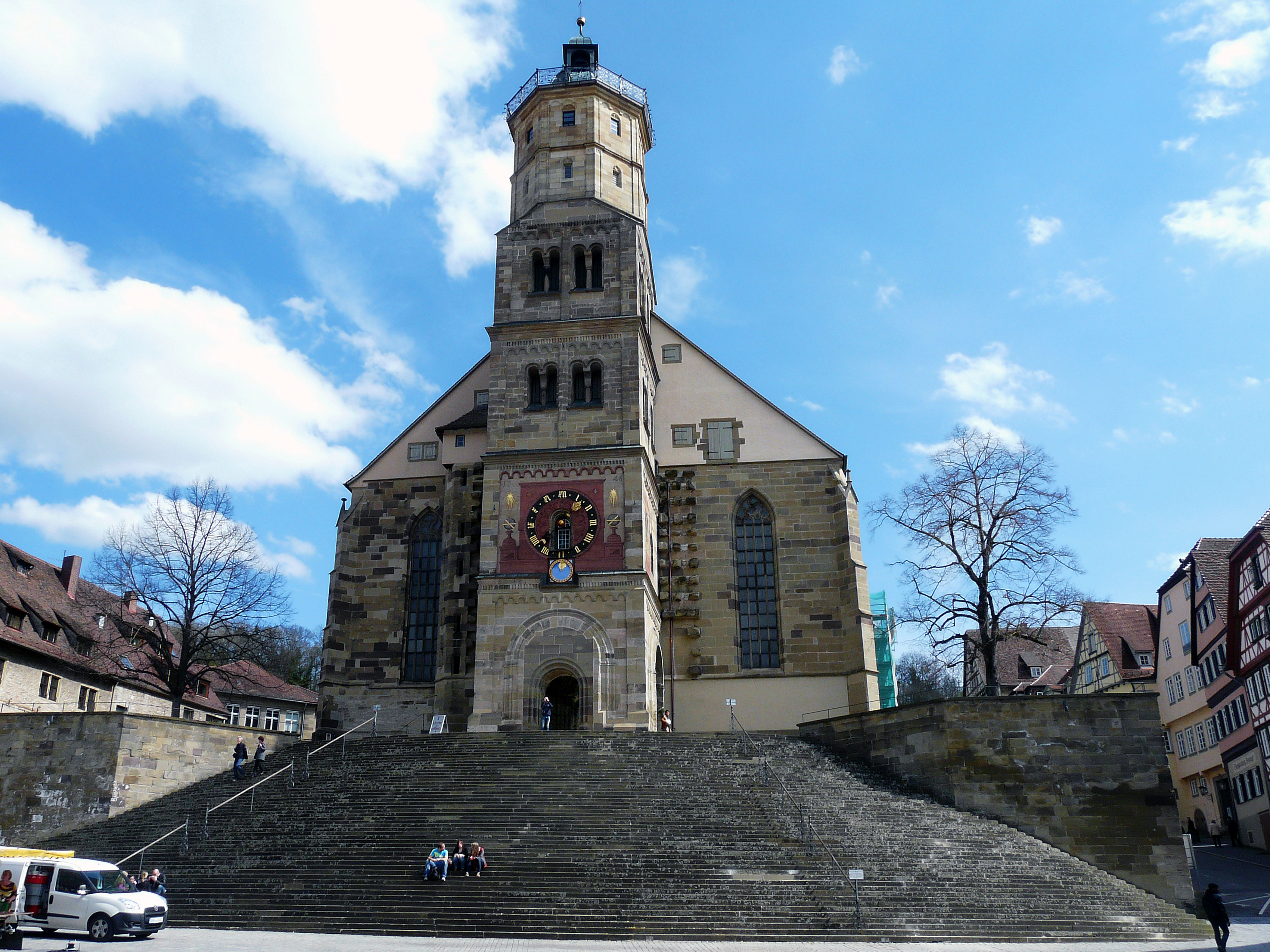 Церковь Святого Михаила